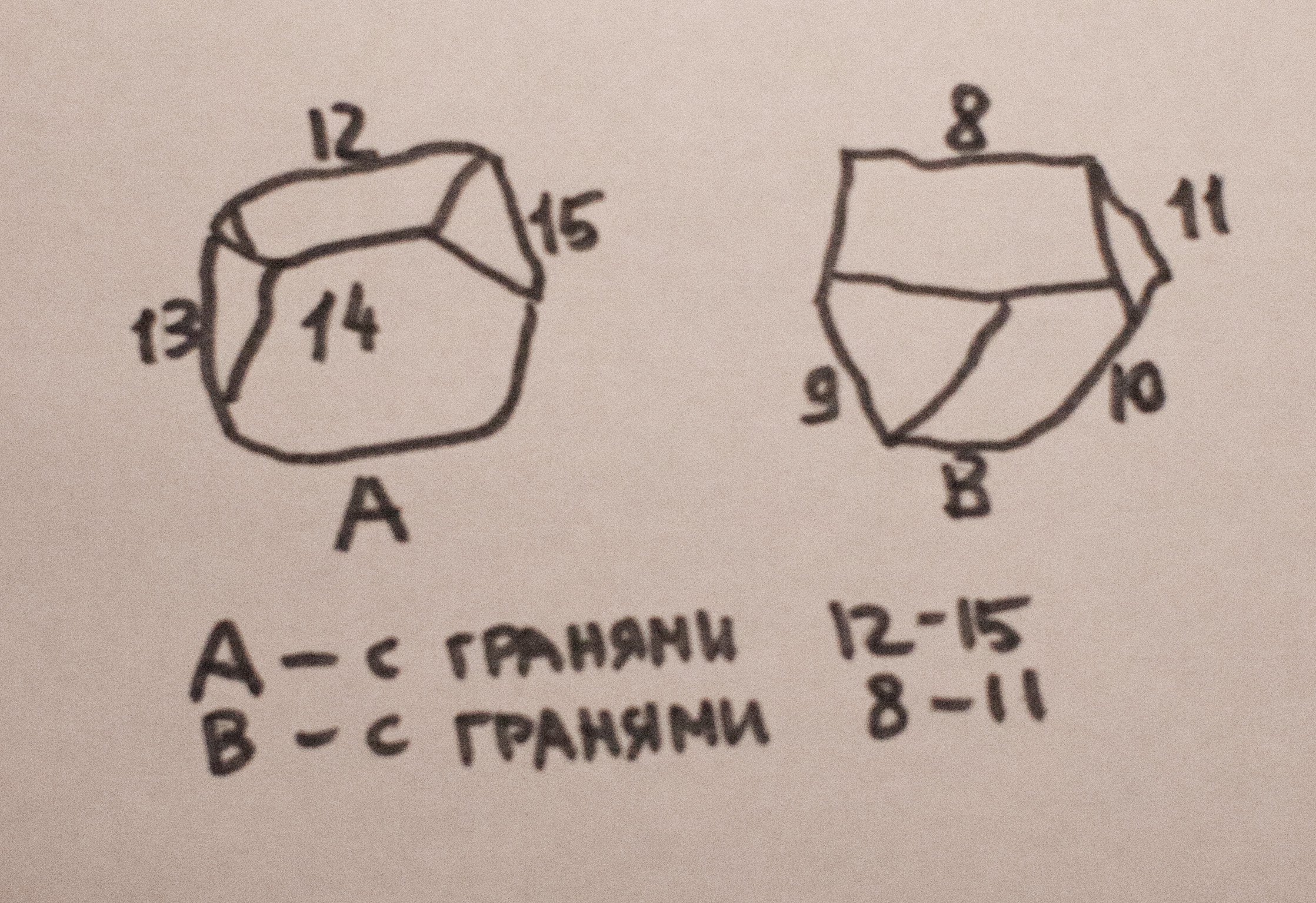 "Головки" алмаза "Шах", схема согласно исследованию А. Е. Ферсмана, опубликованному в книге "Кристаллография алмаза"